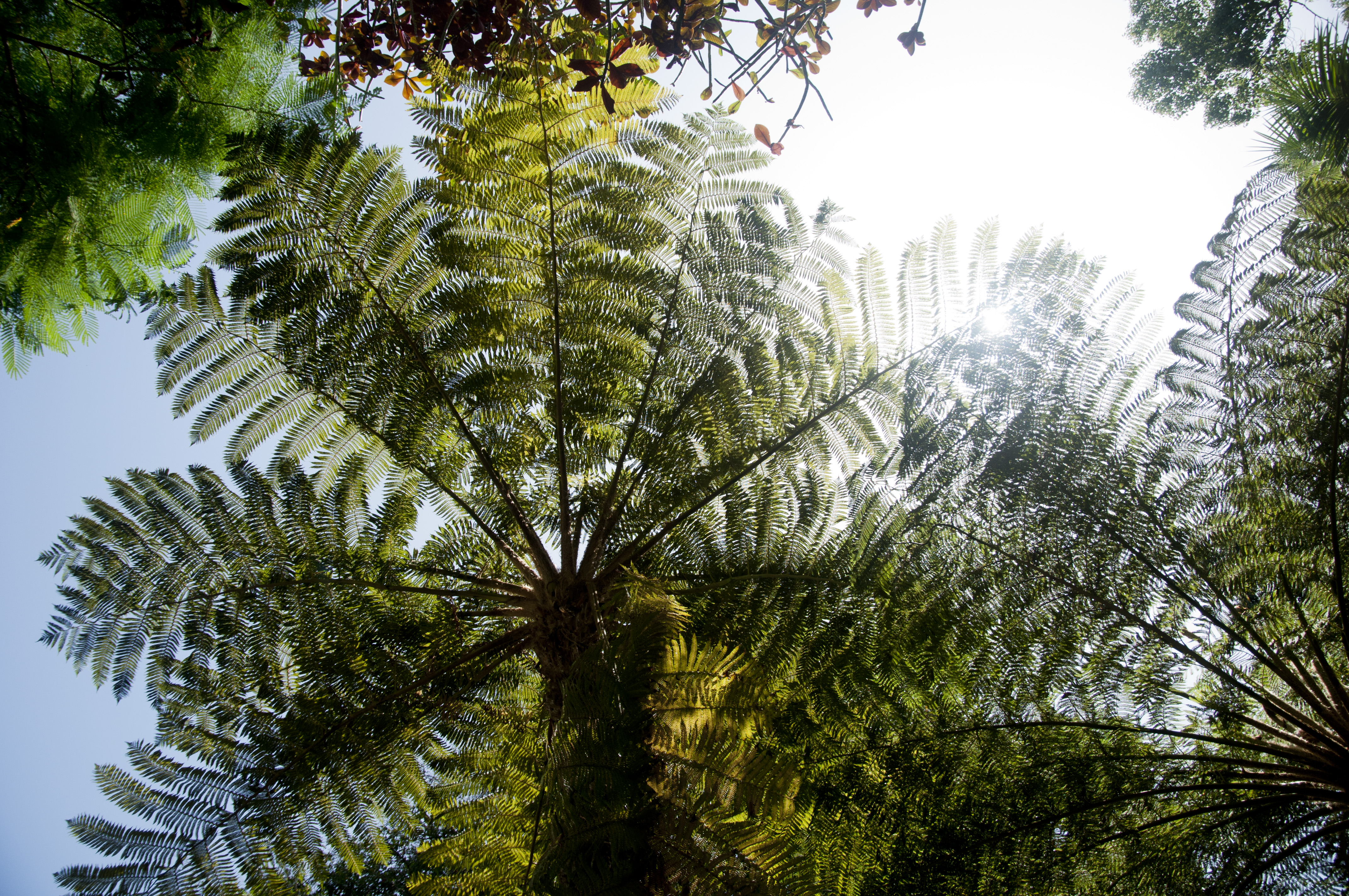 Fetos arbóreos no Jardim Municipal, Funchal, Dicksonia arborescens